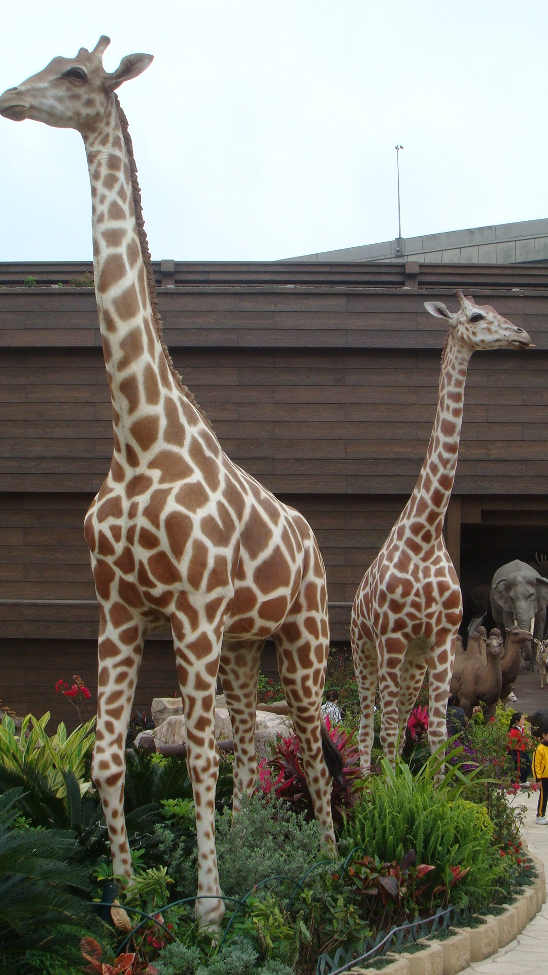 長頸鹿